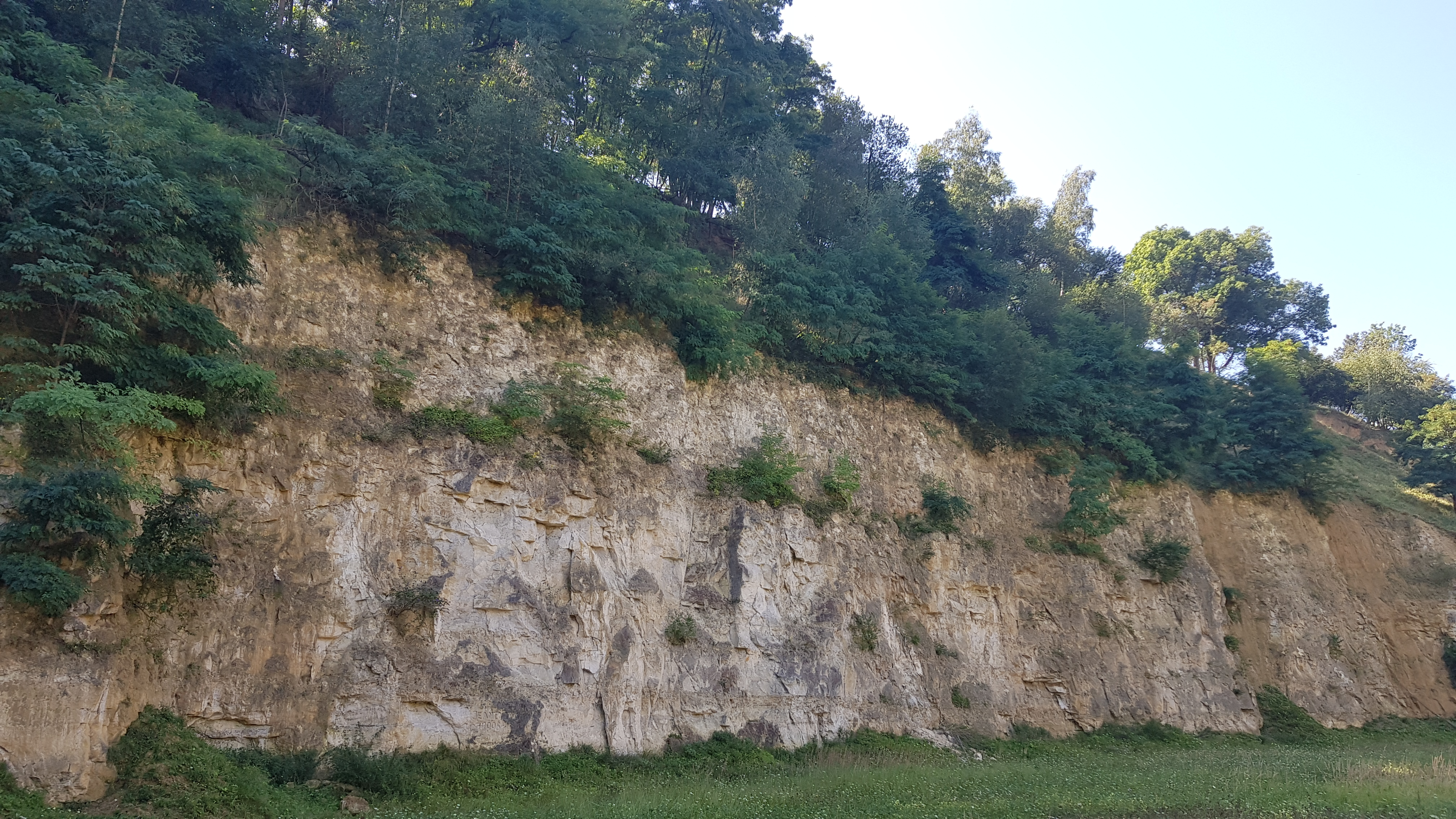 Curfsgroeve, Geulhem, Nederland